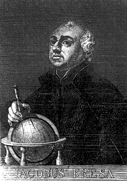 Jakub Kresa (1648 - 1715), Český jezuitský matematik.